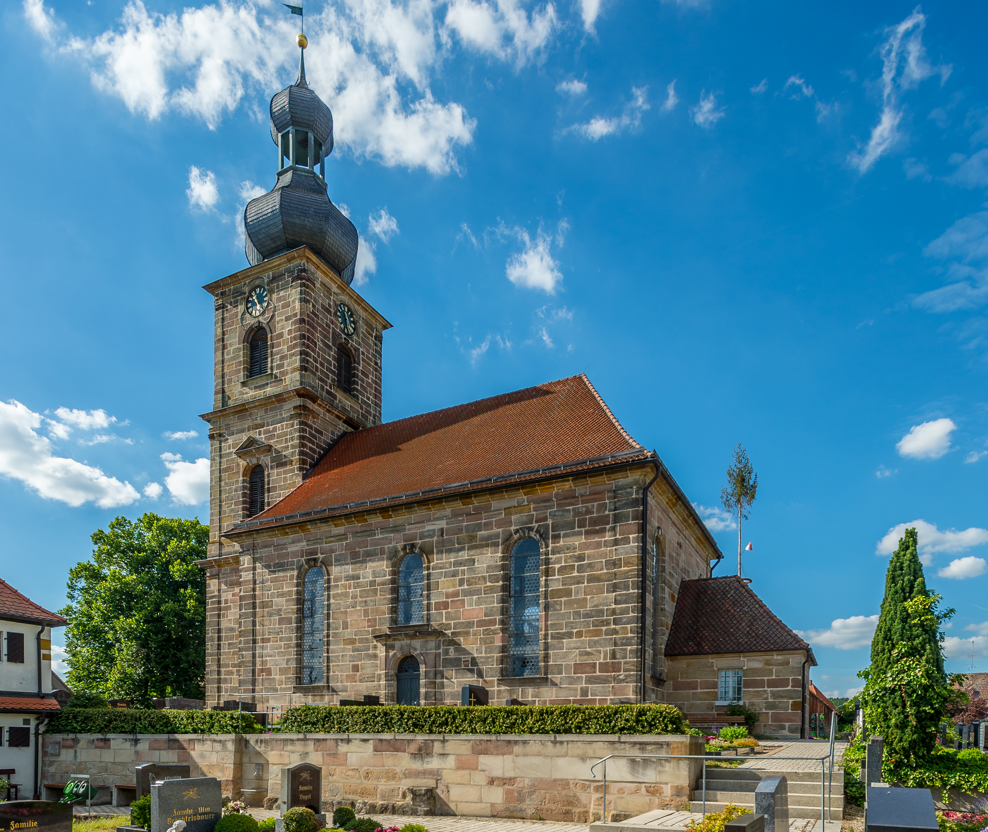 evangelische Kirche St. Matthäus Uttenreuth